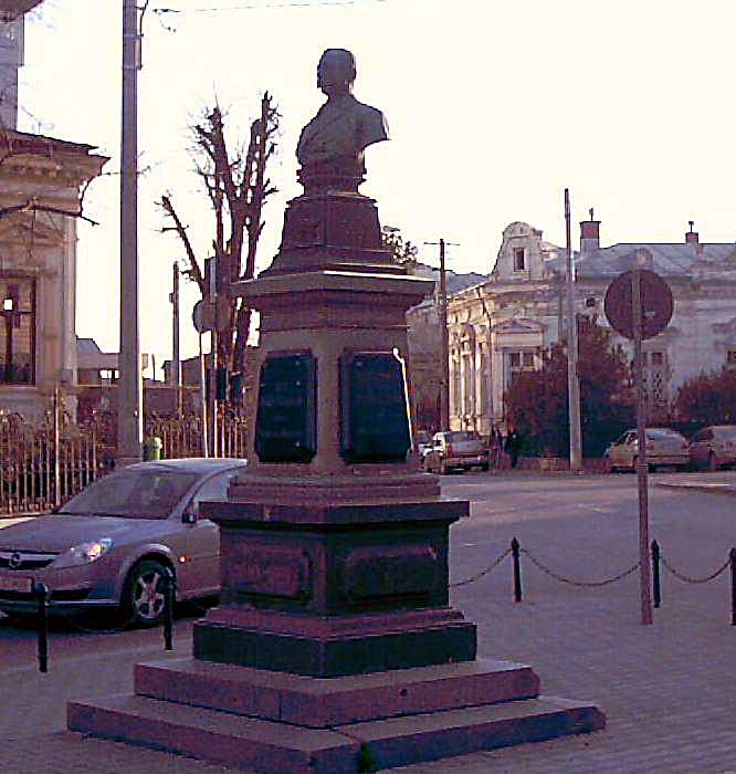 Bust în Ploiești dedicat lui Radu Stanian